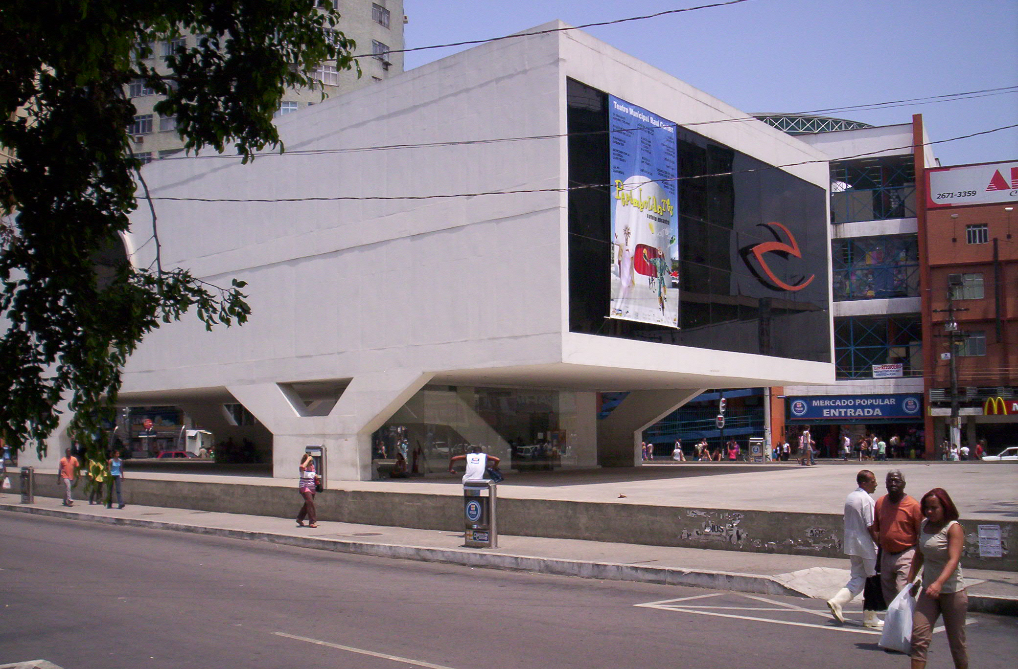 Municipal Library, Duque de Caxias, RJ, Brazil